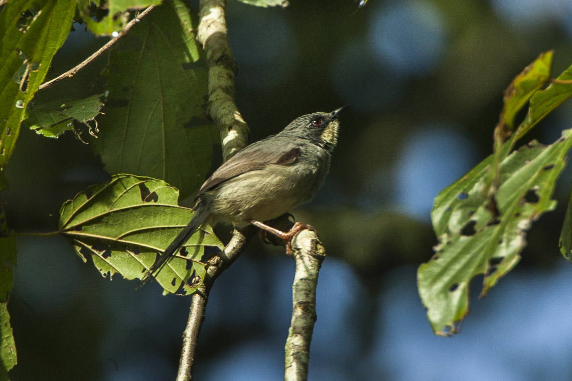 White-chinned Prinia - Kakamega Kenya 06_1467